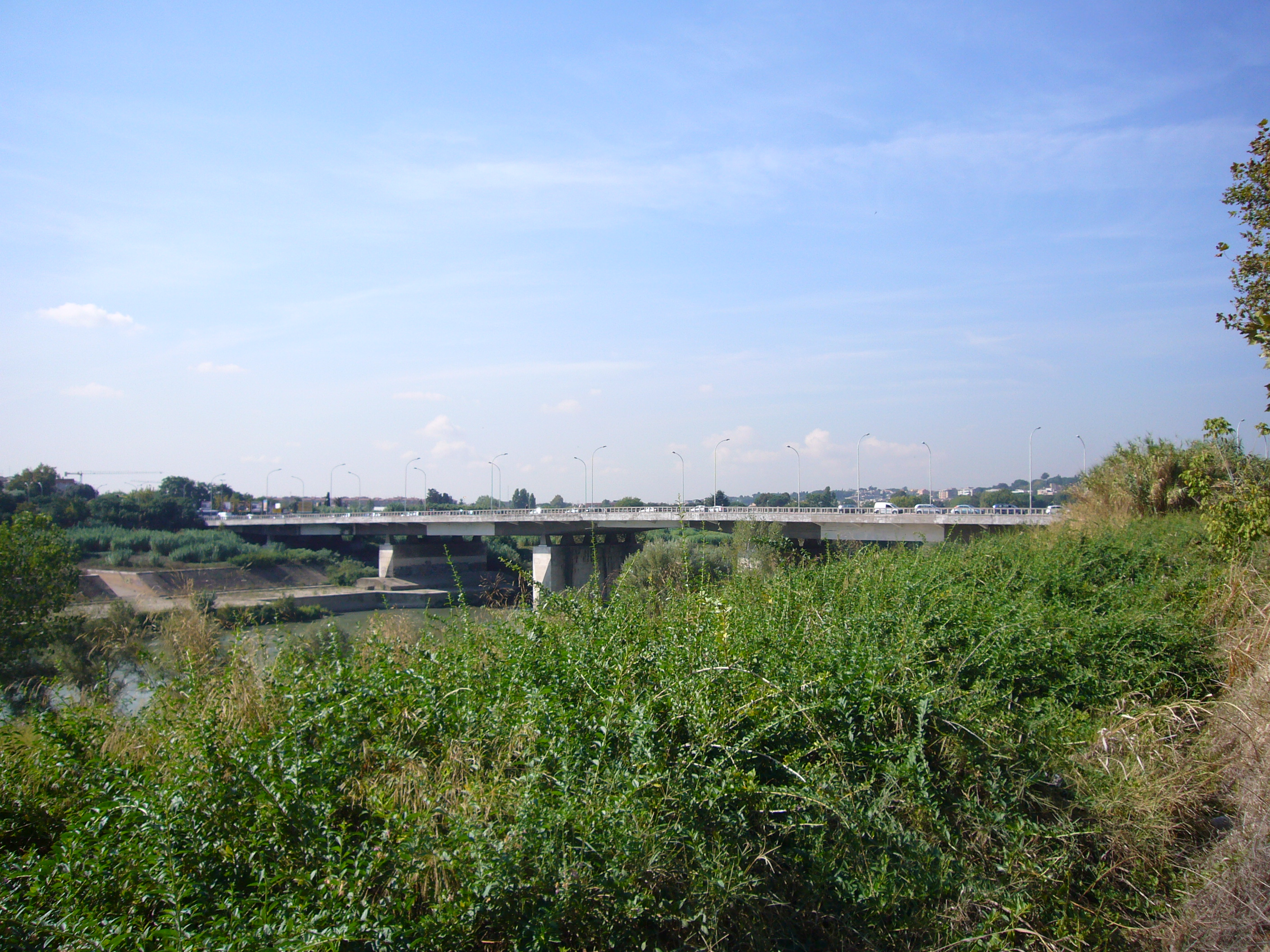 Roma, ponte Guglielmo Marconi